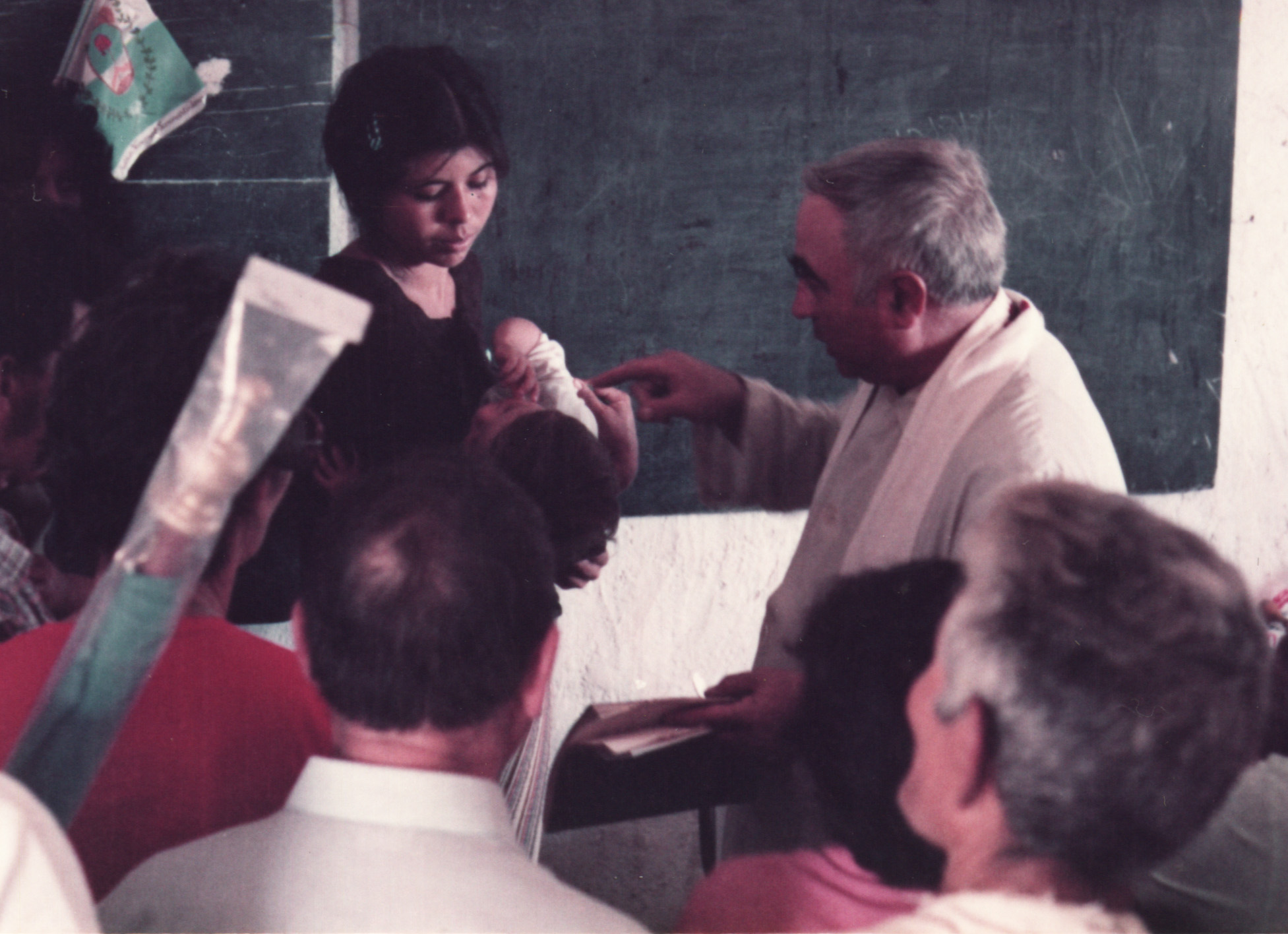 El Padre Nardone bautiza a niños en el paraje Cuatro Bocas.